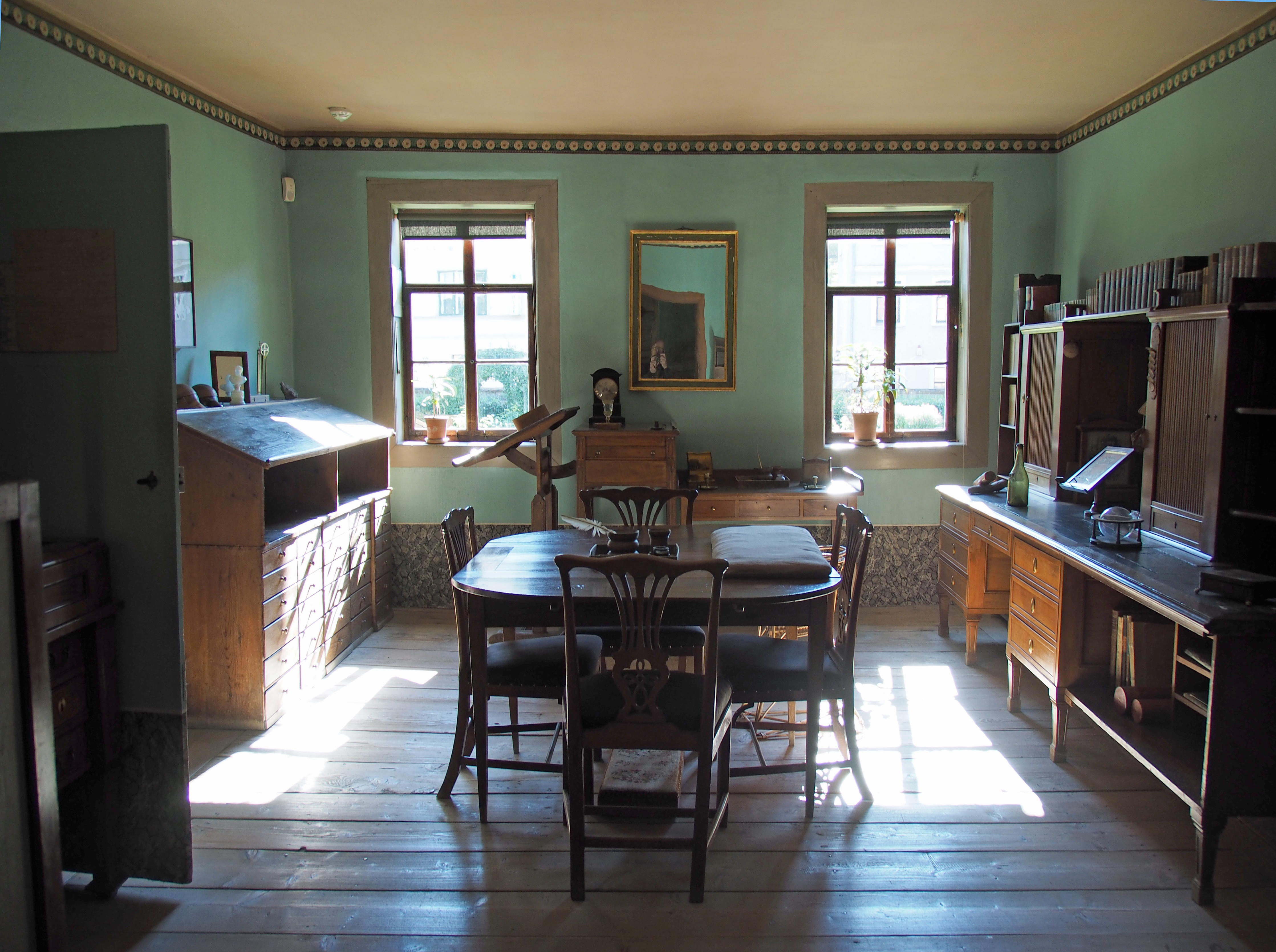 Goethes Arbeitszimmer in Goethes ehemaligem Wohnhaus in Weimar